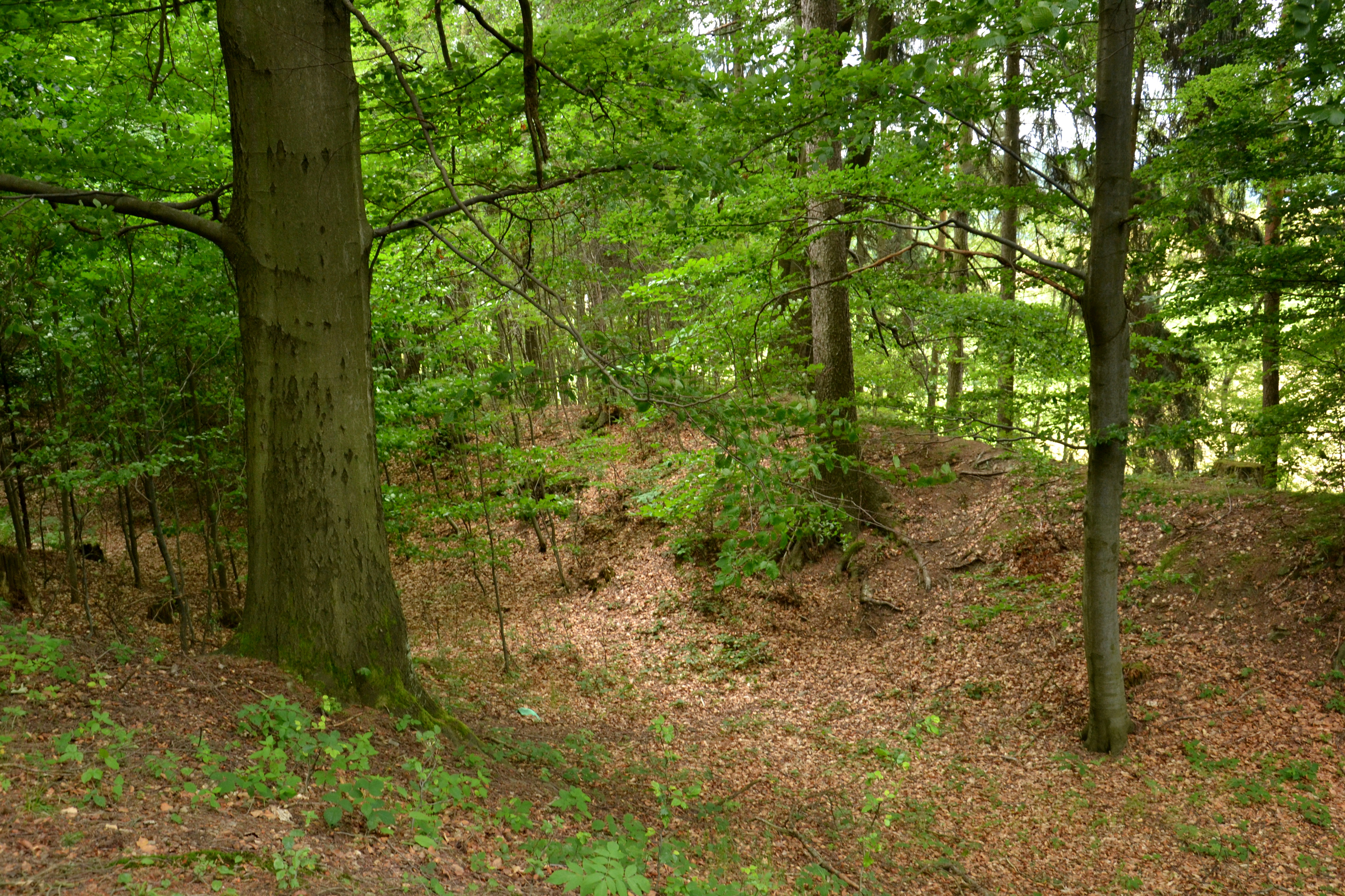 Bystrý – příkop a val na jihovýchodním okraji hradu